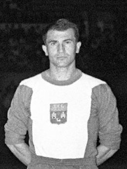 Stadium municipal de Toulouse, 1bis allées Gabriel-Biénès. 3 septembre 1961. Photo de groupe de l'équipe du Toulouse Football Club sur le terrain ; cliché pris de nuit ; en arrière-plan gradins et projecteurs. De g. à d. debouts : Robert Mouynet.